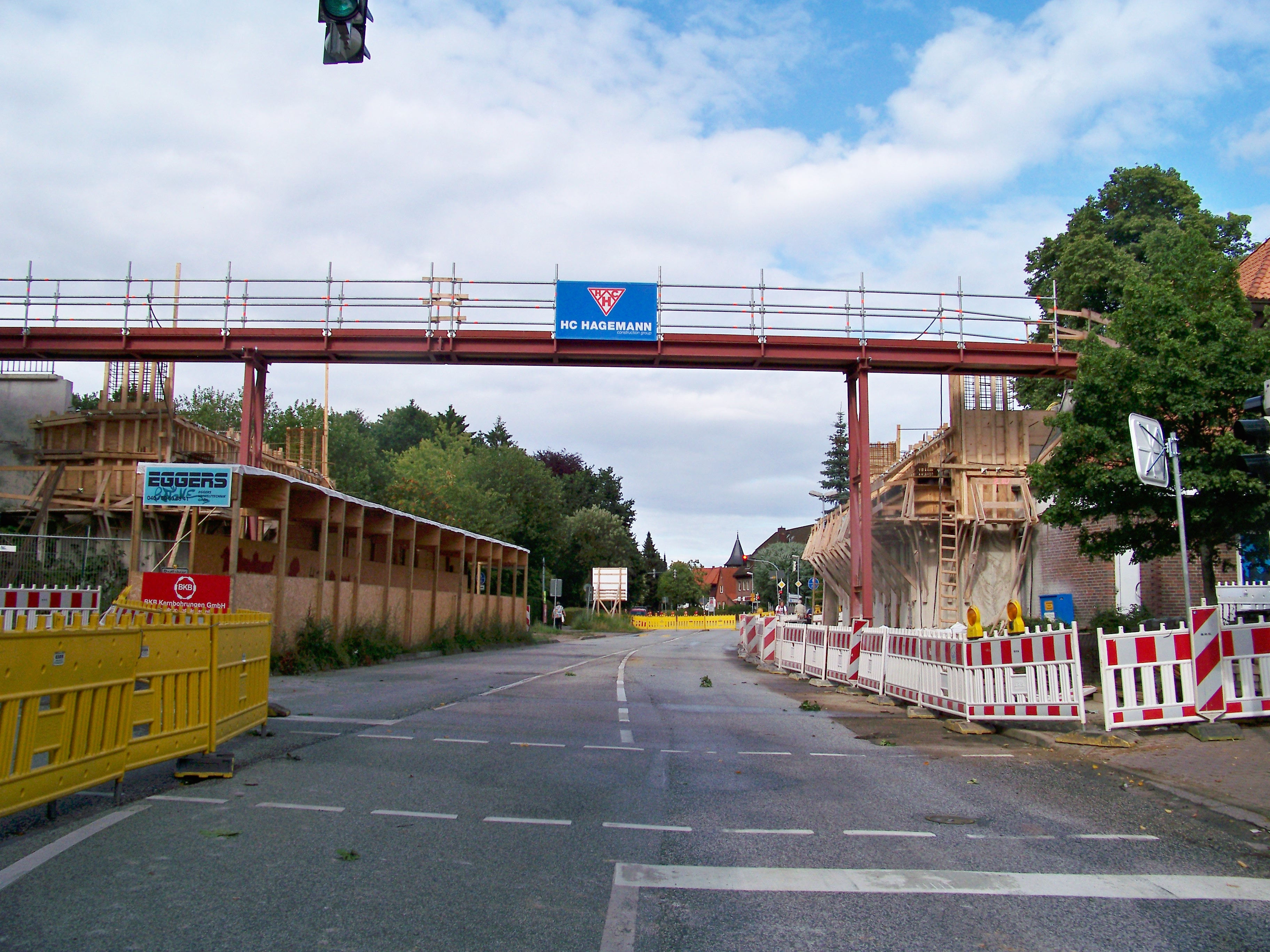 Austausch der U-Bahnbrücken über die Hamburger Straße am U-Bahnhof Hoisbüttel